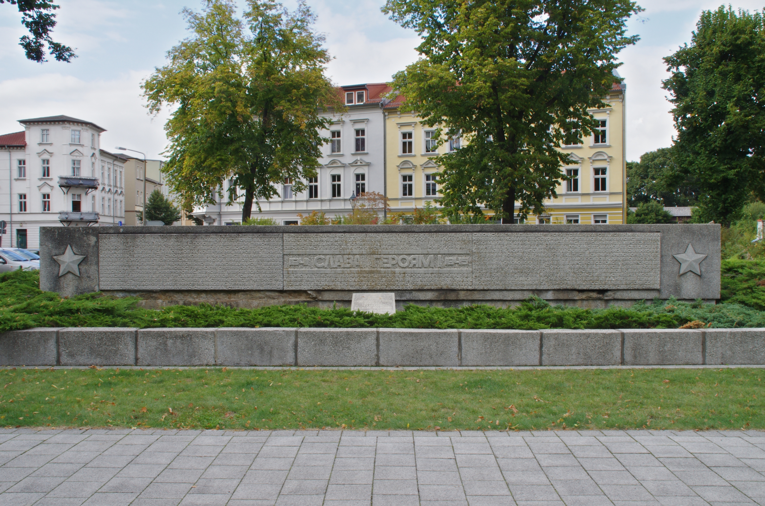 Fürstenwalde in Brandenburg. Das Denkmal befindet sich am Ottomar-Geschke-Platz.